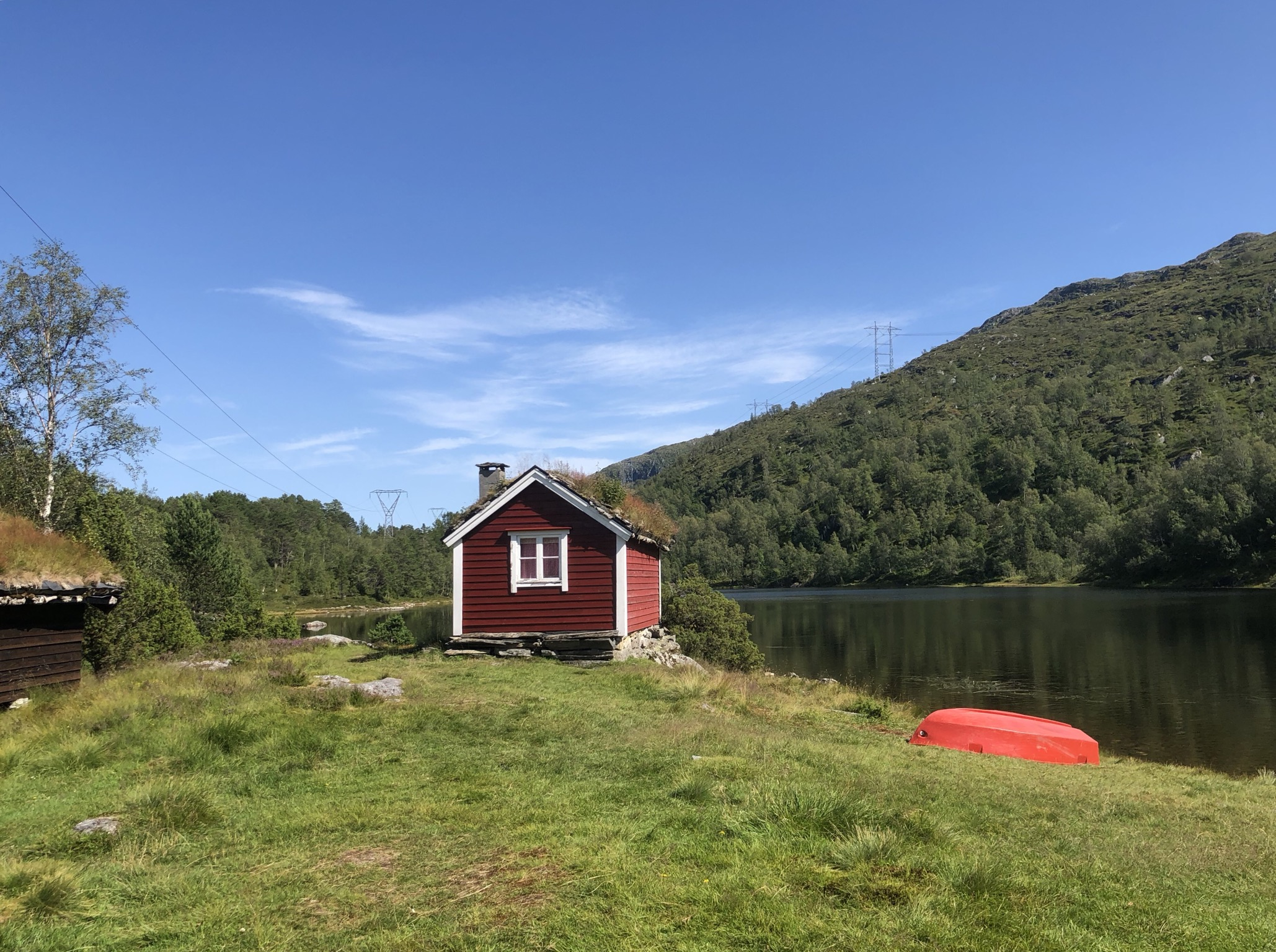 Ossætra